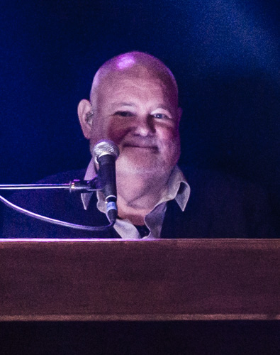 Sven-Ingvars uppträder inför en fulltalig publik på Gröna Lund i Stockholm den 12 augusti 2016. Thommy Gustafsson på keyboard.